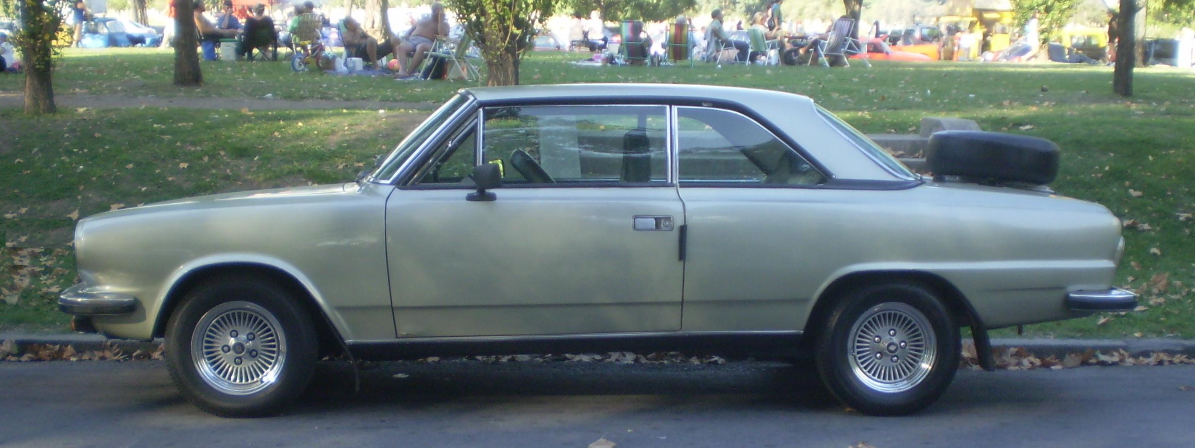 Torino ZX en Buenos Aires.